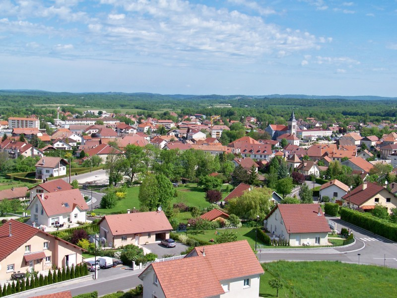 Vue aérienne de la ville de Valdahon, Franche-Comté, Doubs, France